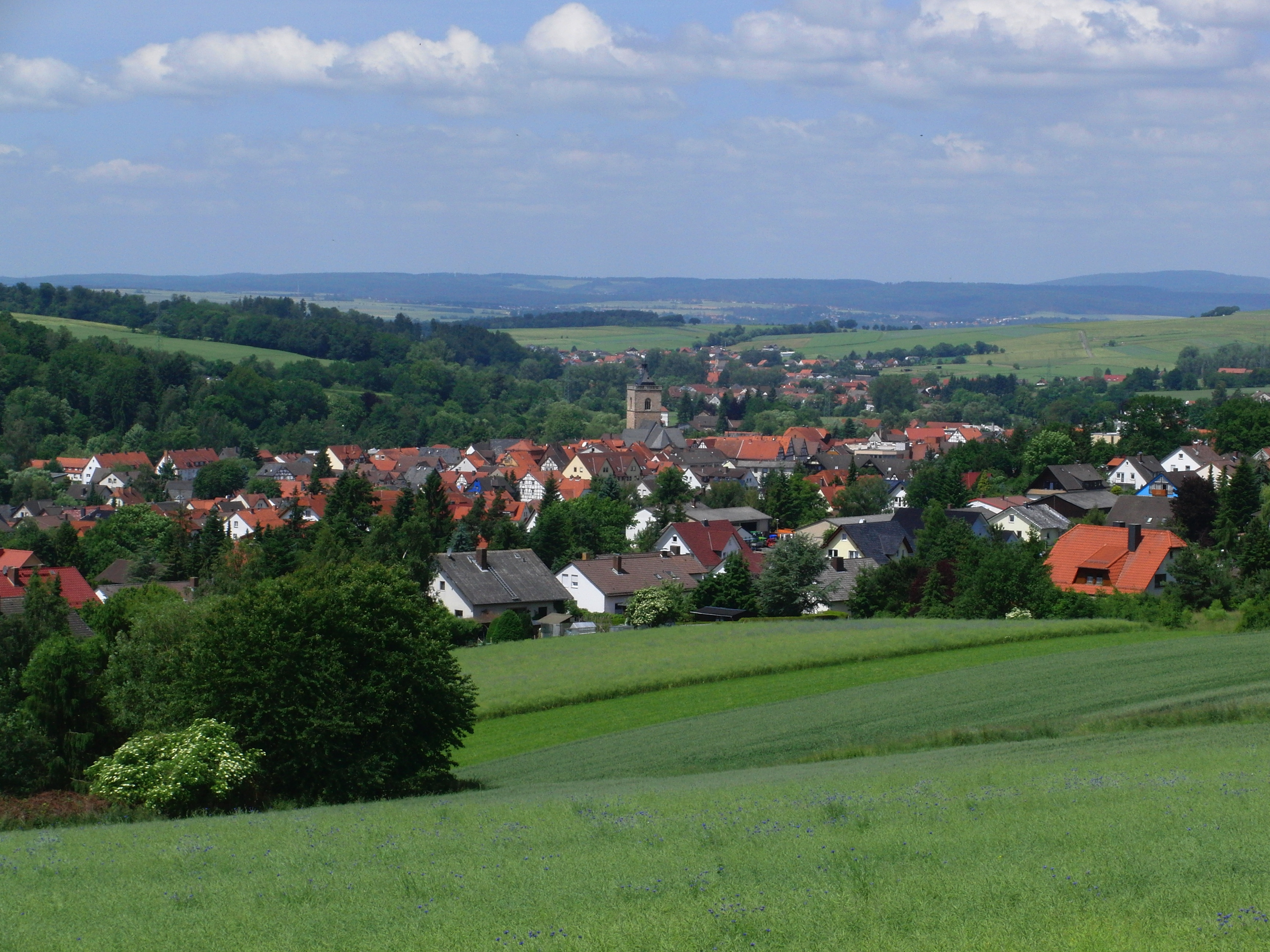 Neukirchen (Knüll) in Schwalm-Eder-Kreis, Hessen, fotografiert vom Knüll-House – EC Freizeitheim